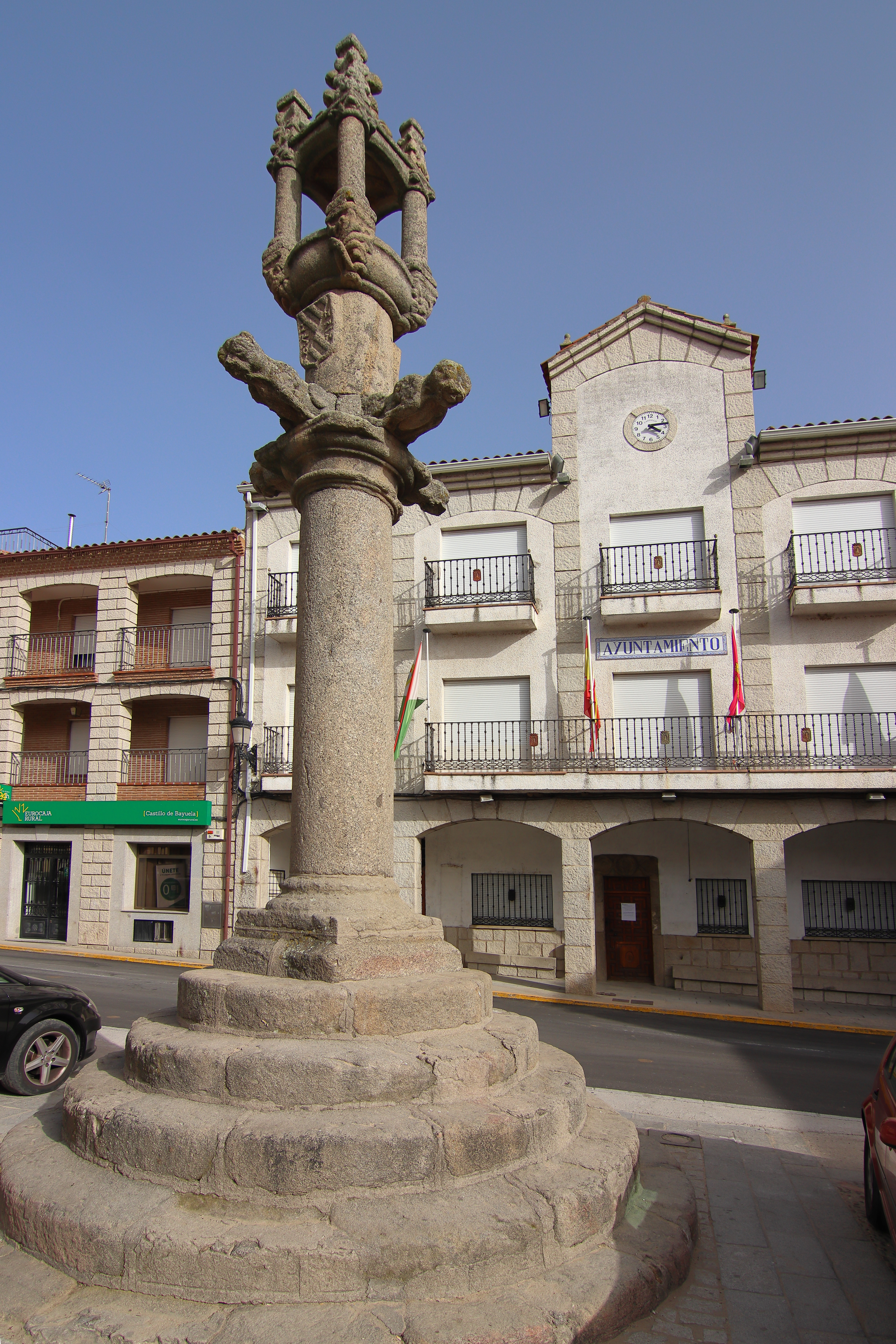 Picota o rollo, Castillo de Bayuela